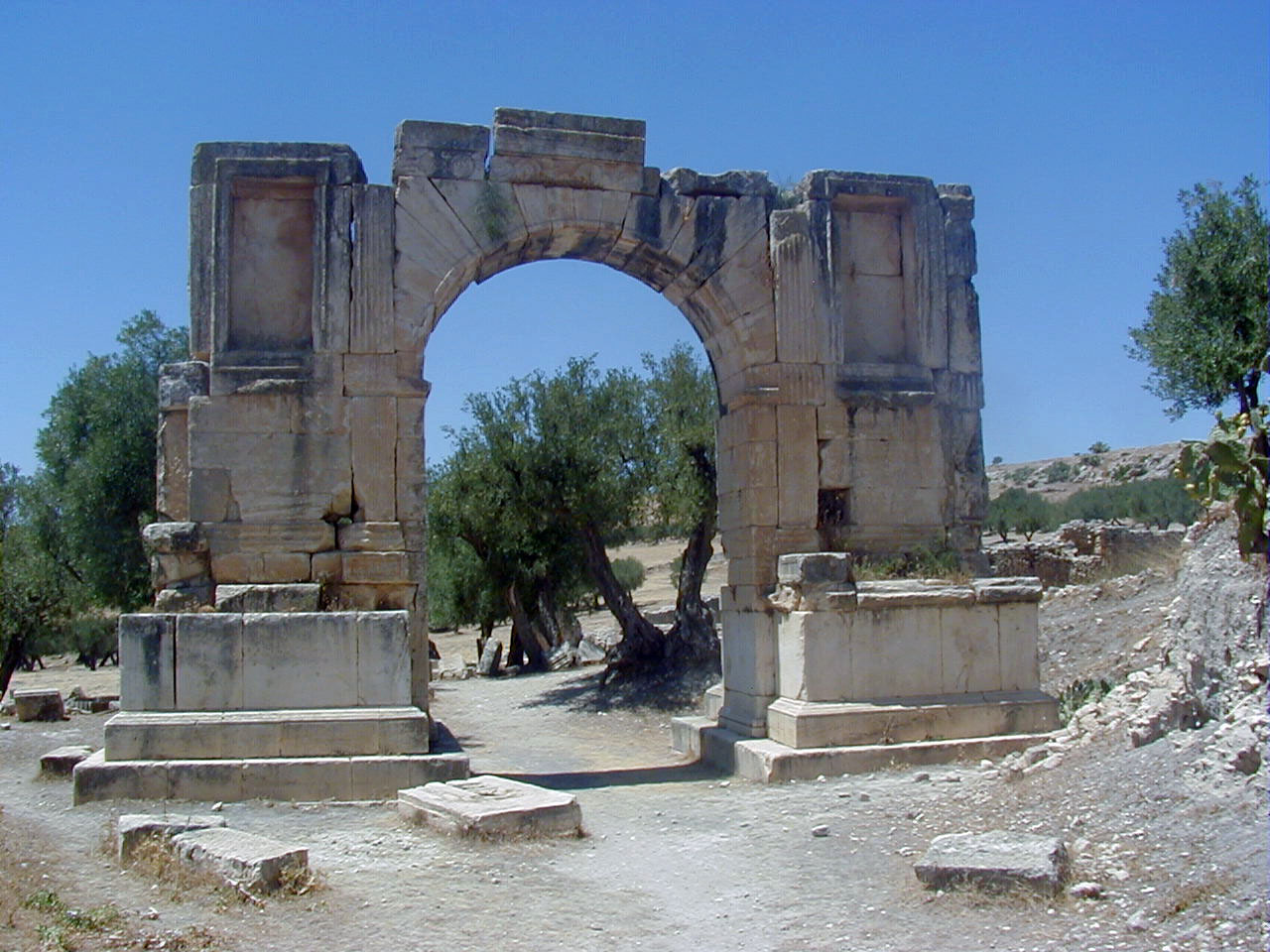 Arc de Sévère Alexandre à Dougga (Tunisie)